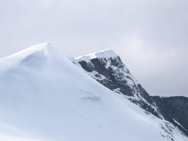 Glittertind, Norway